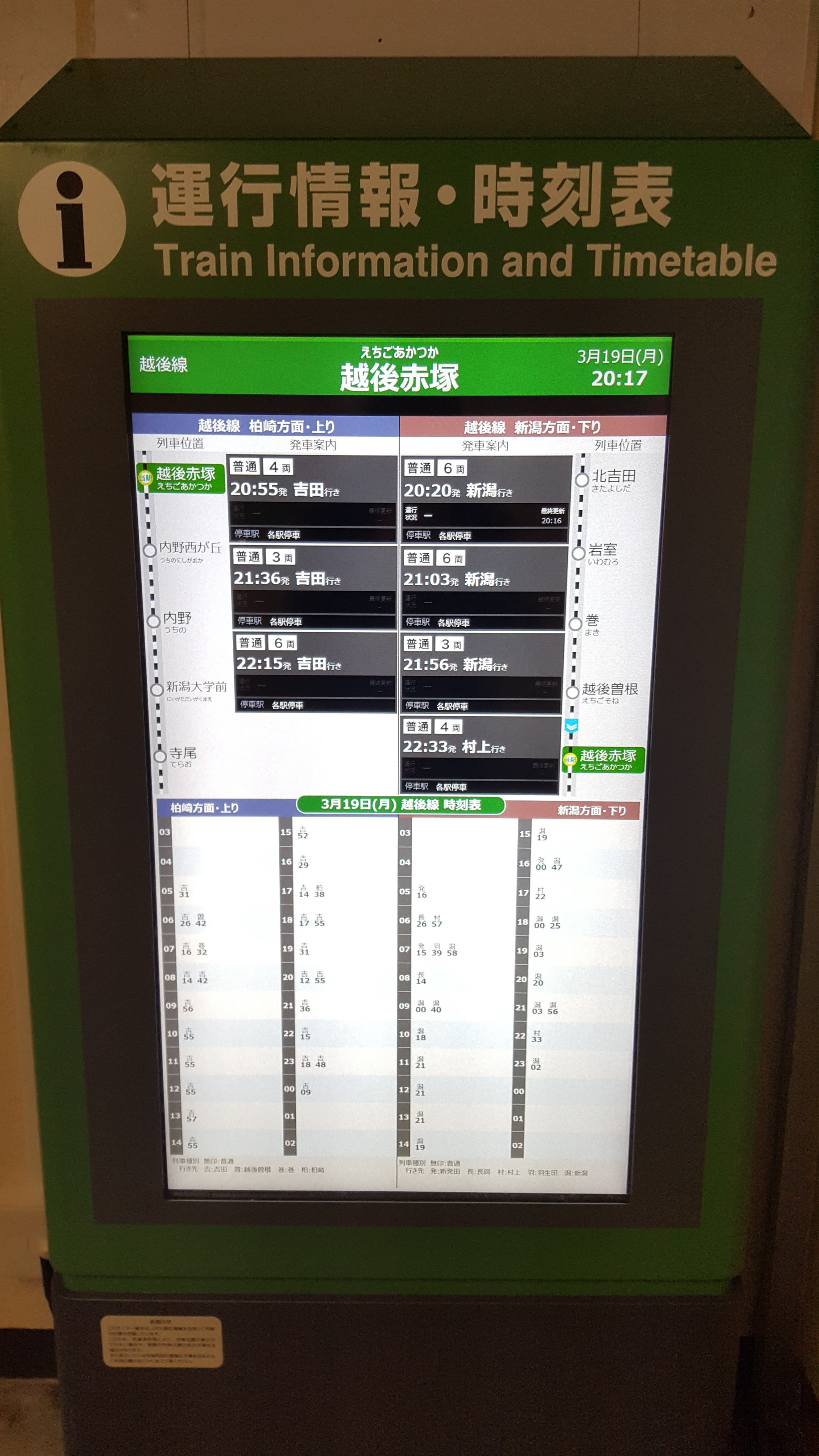 越後赤塚駅駅舎内に設置されたデジタルサイネージ